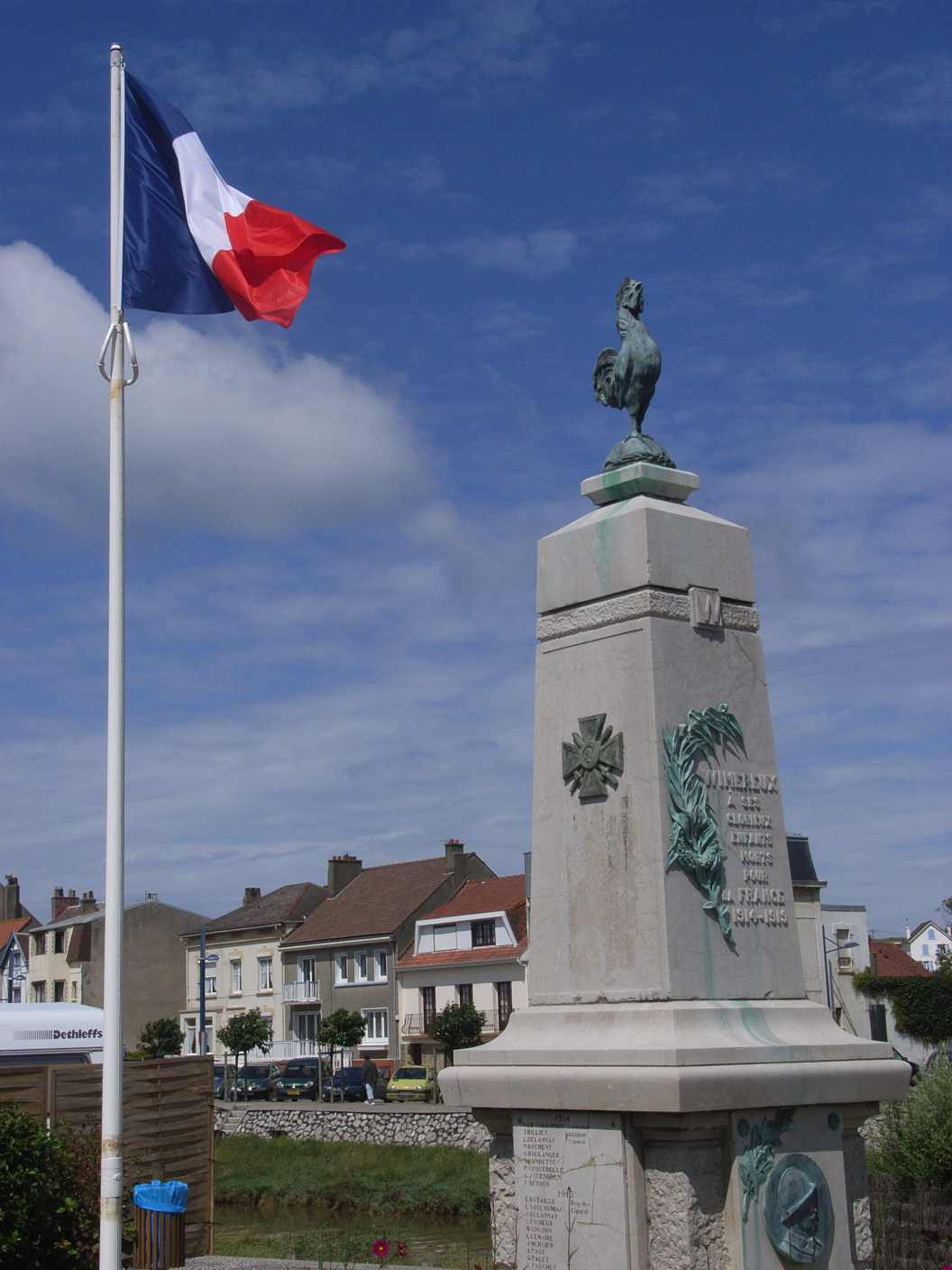 gallischer Hahn, Trikolore, Ehrenmal Wimereux; War memorial Wimereux (1914-1919), Pas de Calais, FR